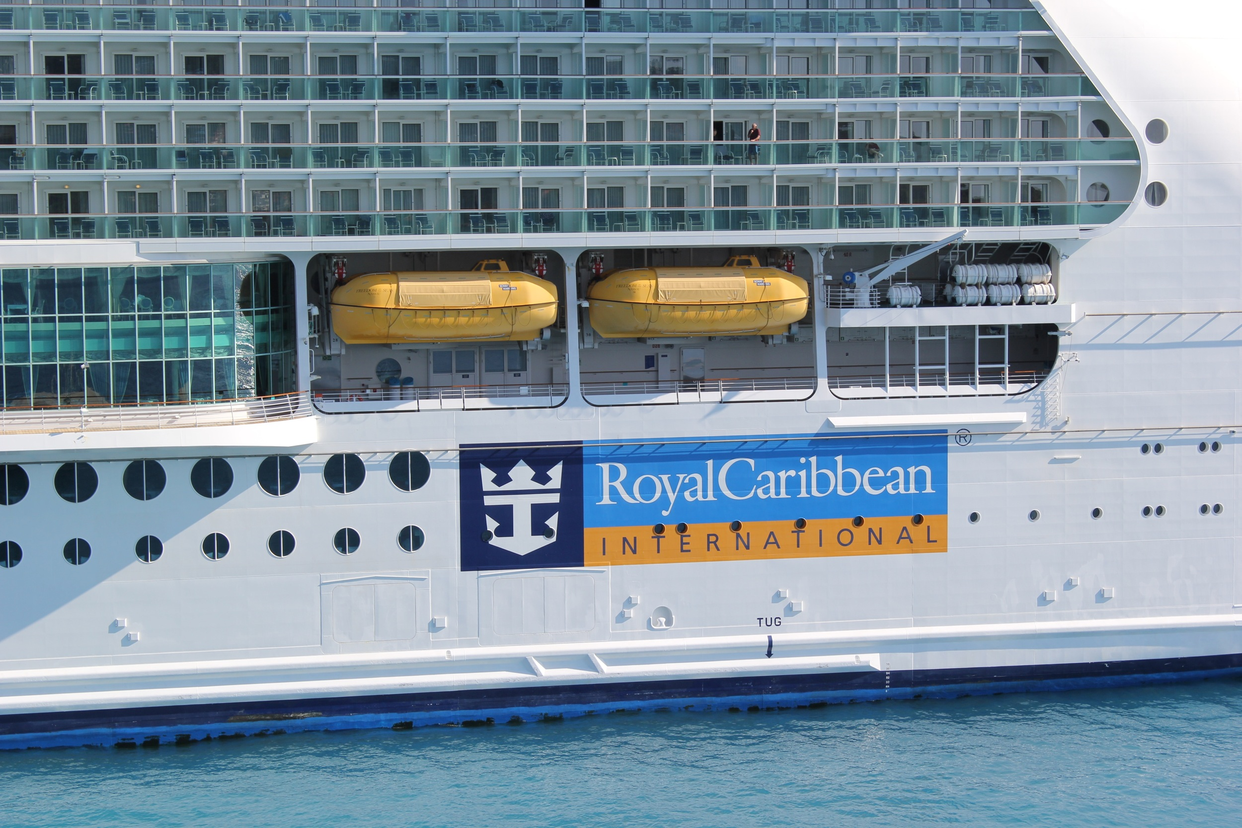 St Maarten